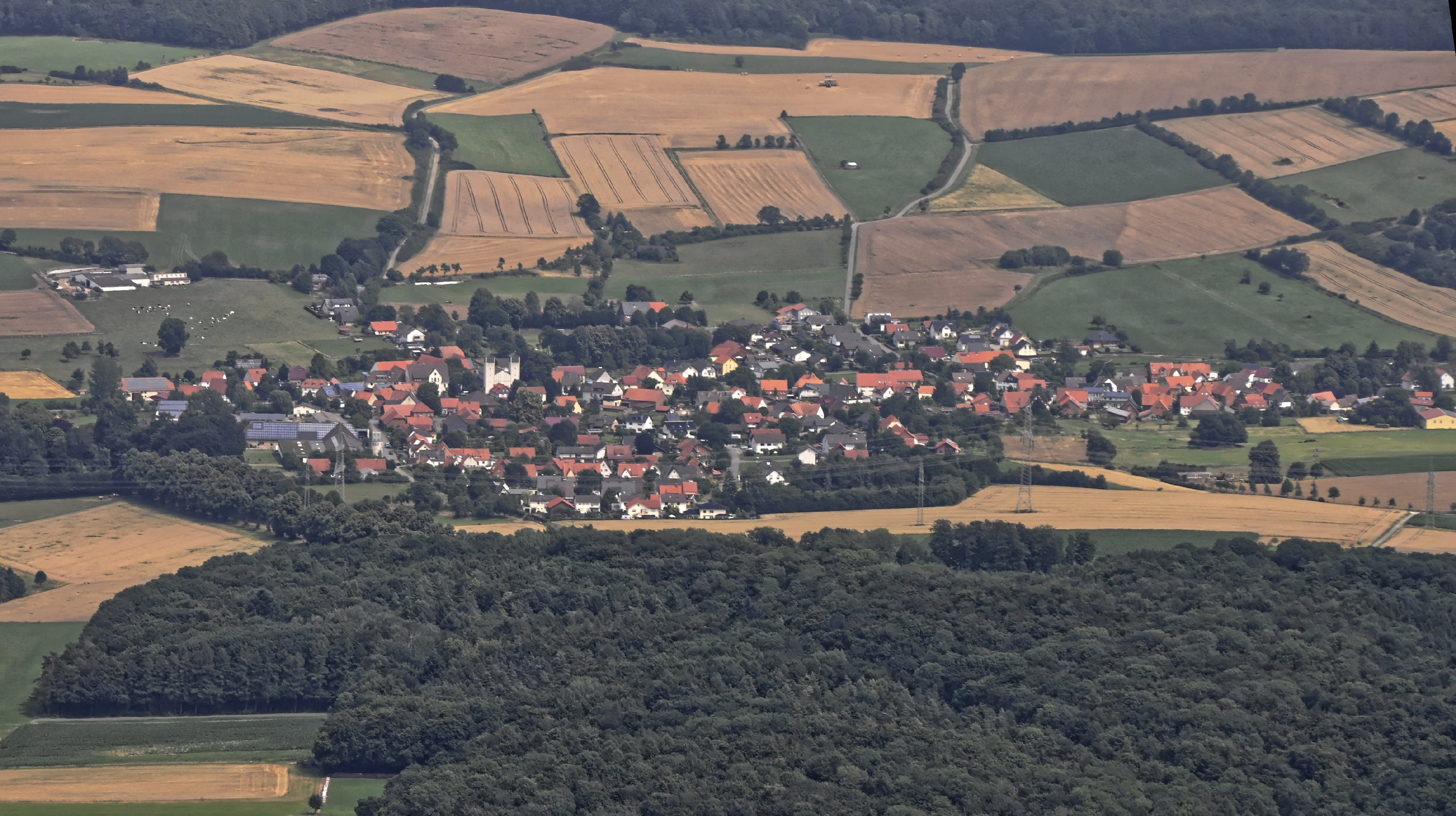 Bilder vom Flug Nordholz-Hammelburg 2015: Bökendorf